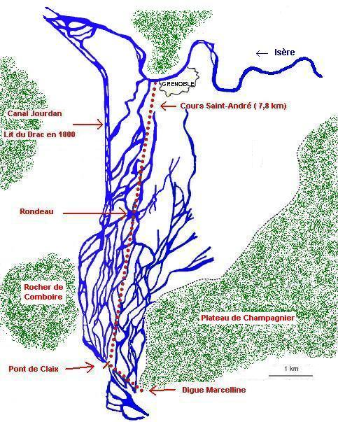 Plaine de Grenoble avec superposition des cheminements du Drac, avant et après son endiguement de 1675 à 1686, puis après 1771 pour le confluent.